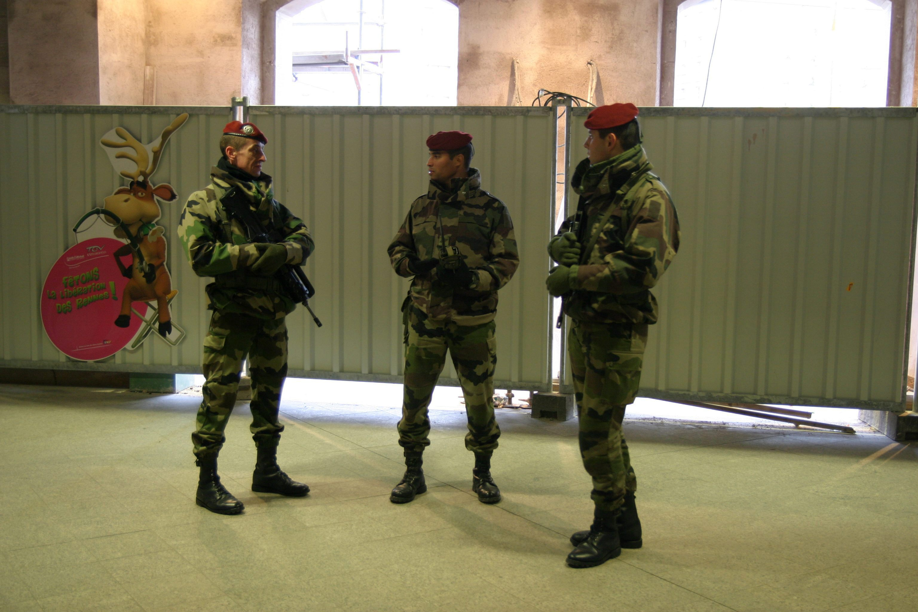 Soldats français déployés à la gare de Strasbourg dans le cadre du plan Vigipirate (3 personnages portant un béret, le quatrième est un renne de dessin animé)